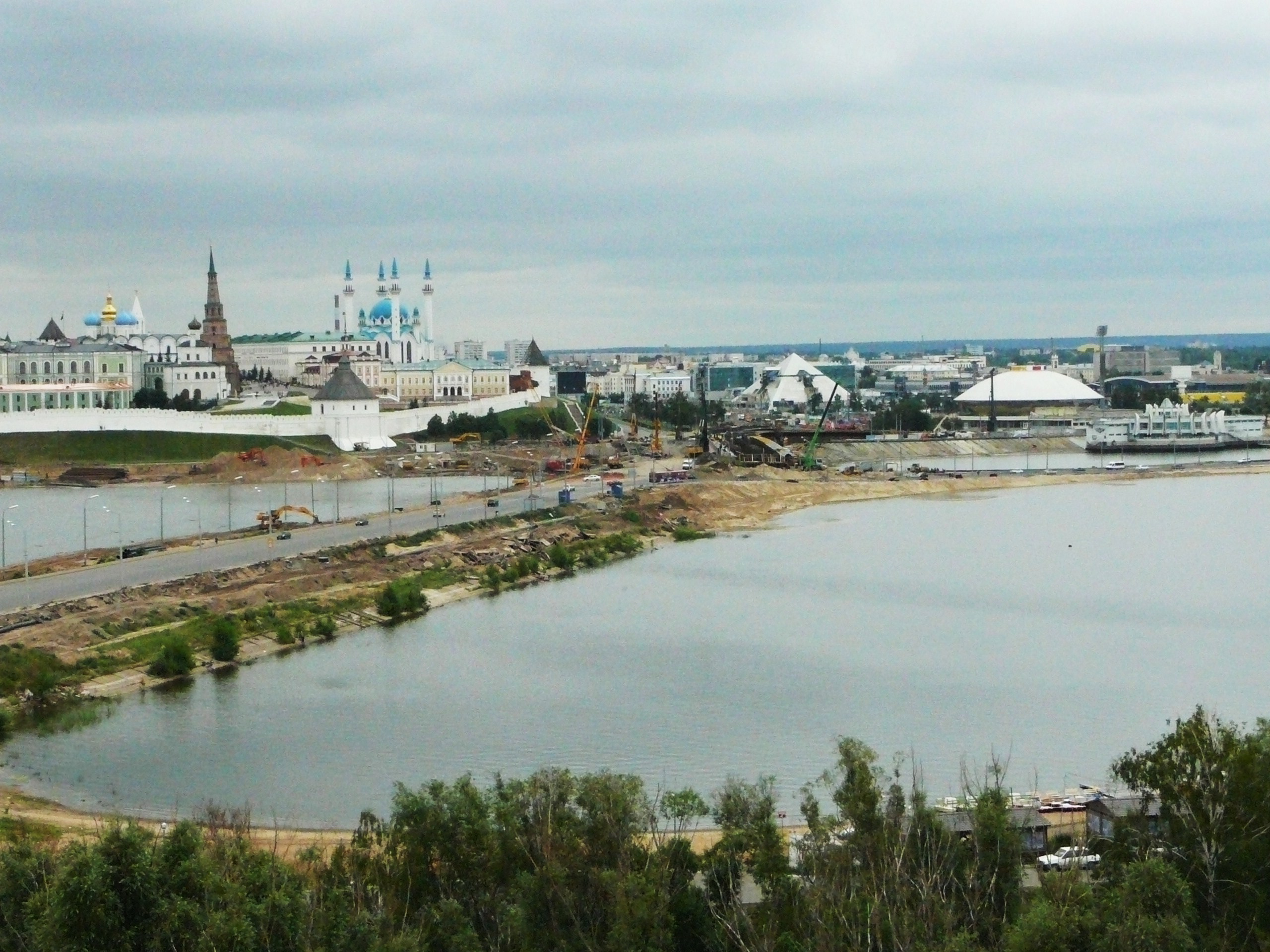 Реконструкция Кремлёвской транспортной дамбы (Казань, 1 июля 2012 г.). Снимок сделан с колеса обозрения в парке "Кырлай".